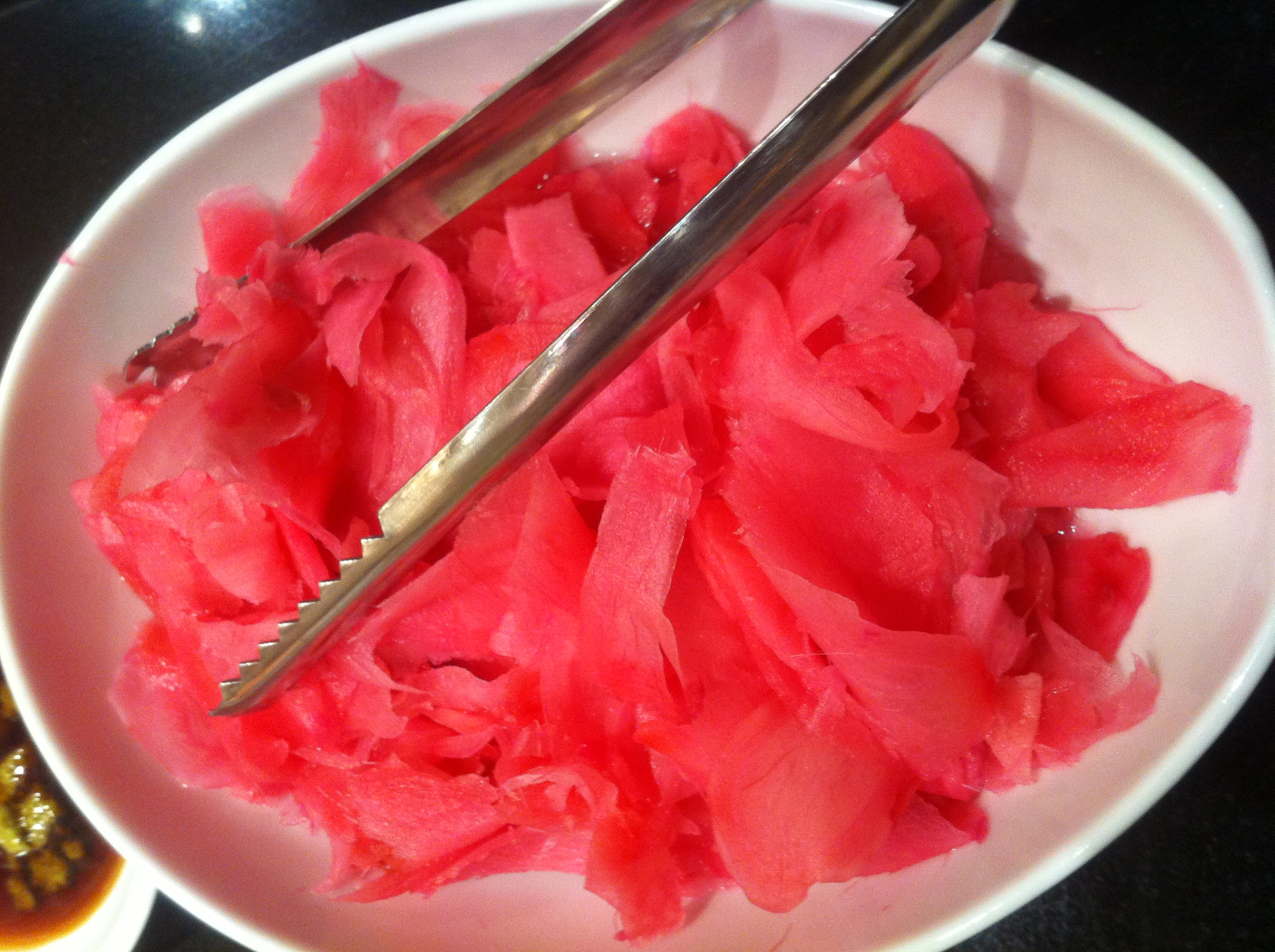 中文（香港）: 香港怡東酒店 自助餐 酸薑